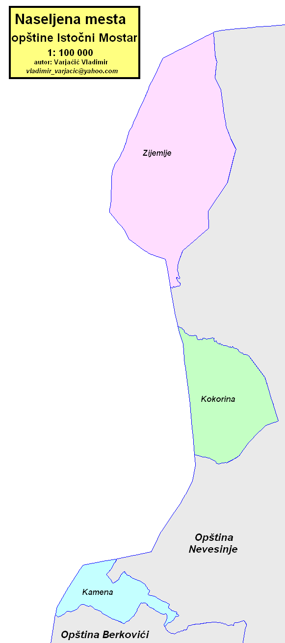 Opština Istočni Mostar